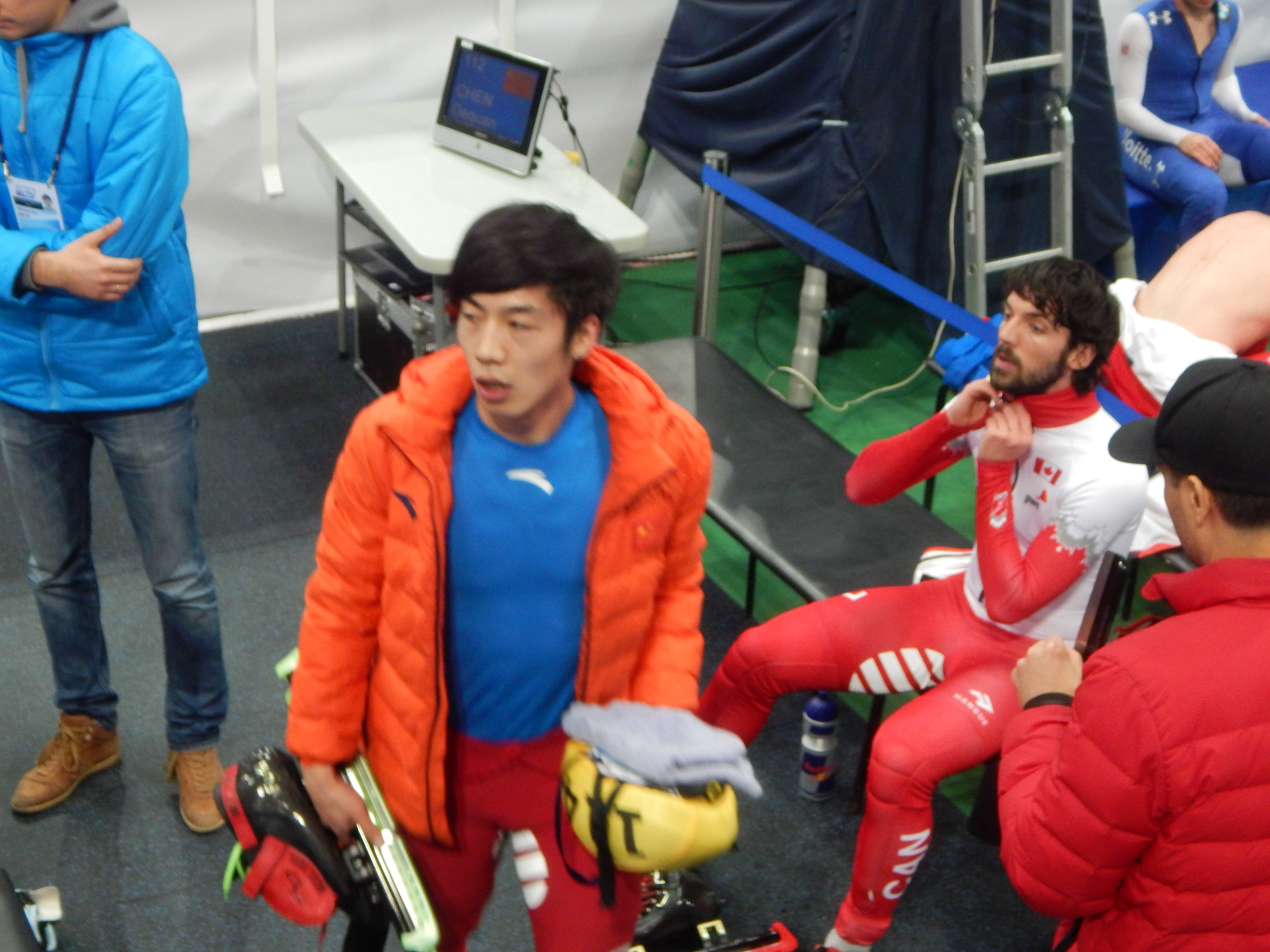 Чемпионат мира по шорт-треку 2015 в Москве Эстафета. Мужчины. Полуфинал. 2 забег